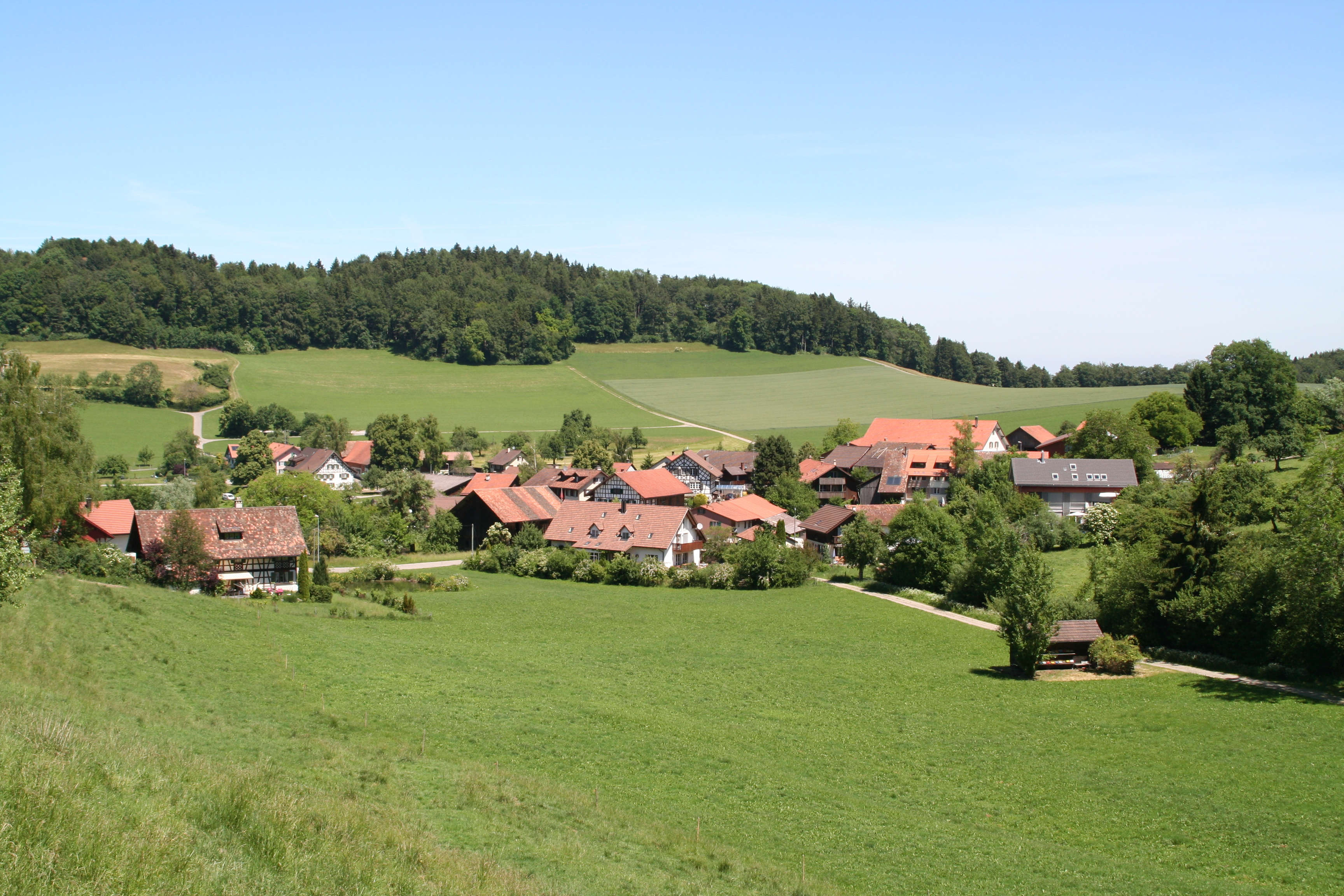 Schlatt ZH Oberschlatt